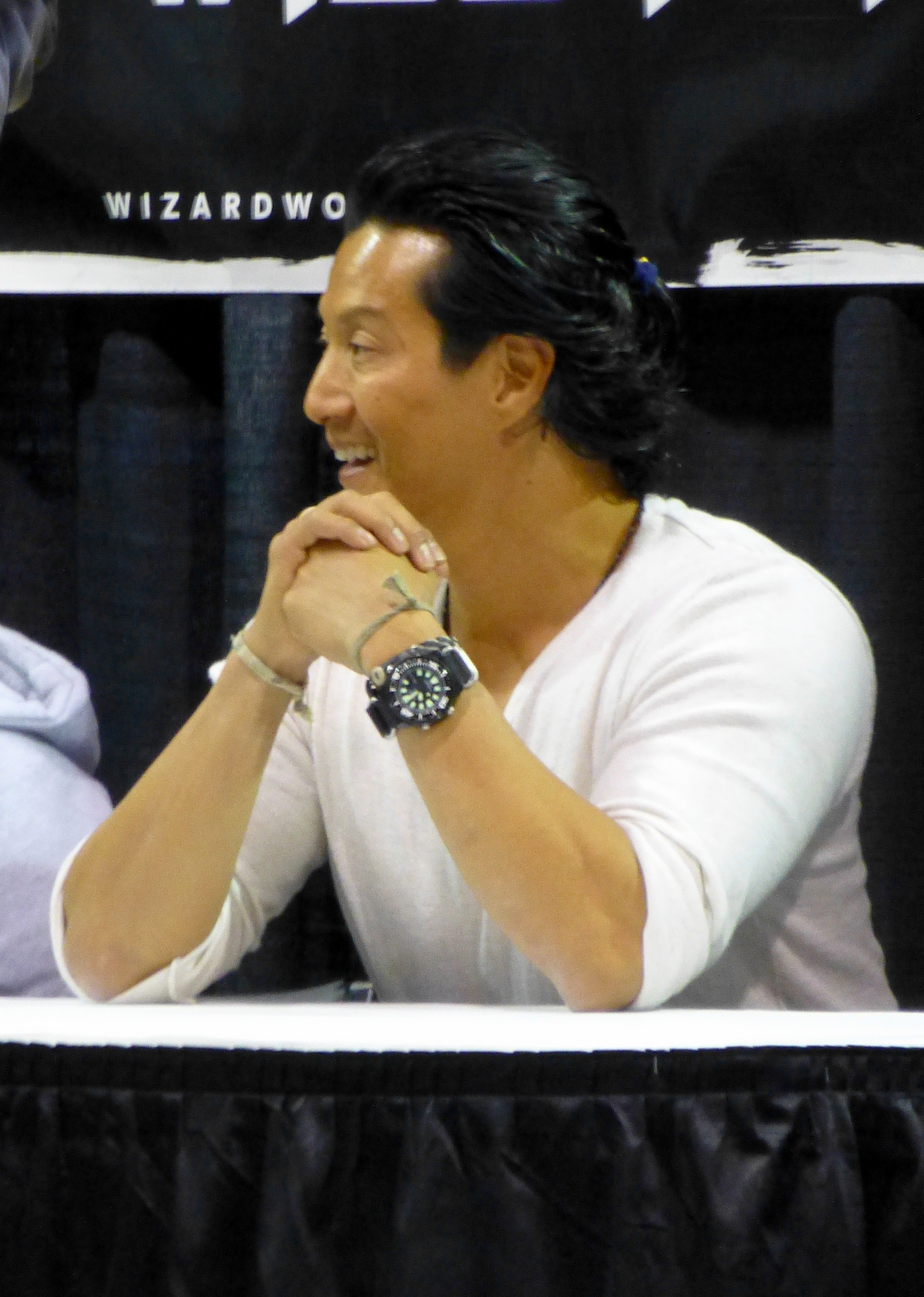 Will Yun Lee 01